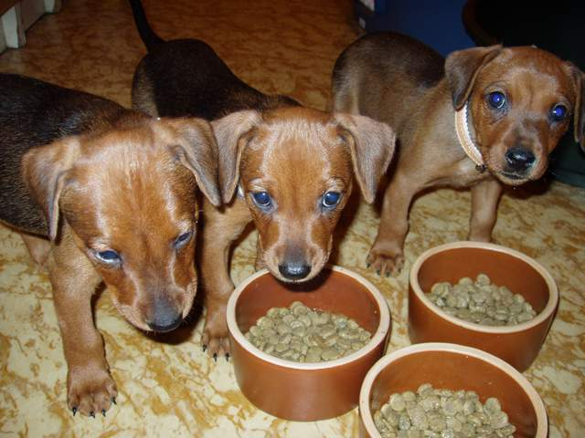 Deutscher Pinscher [1]